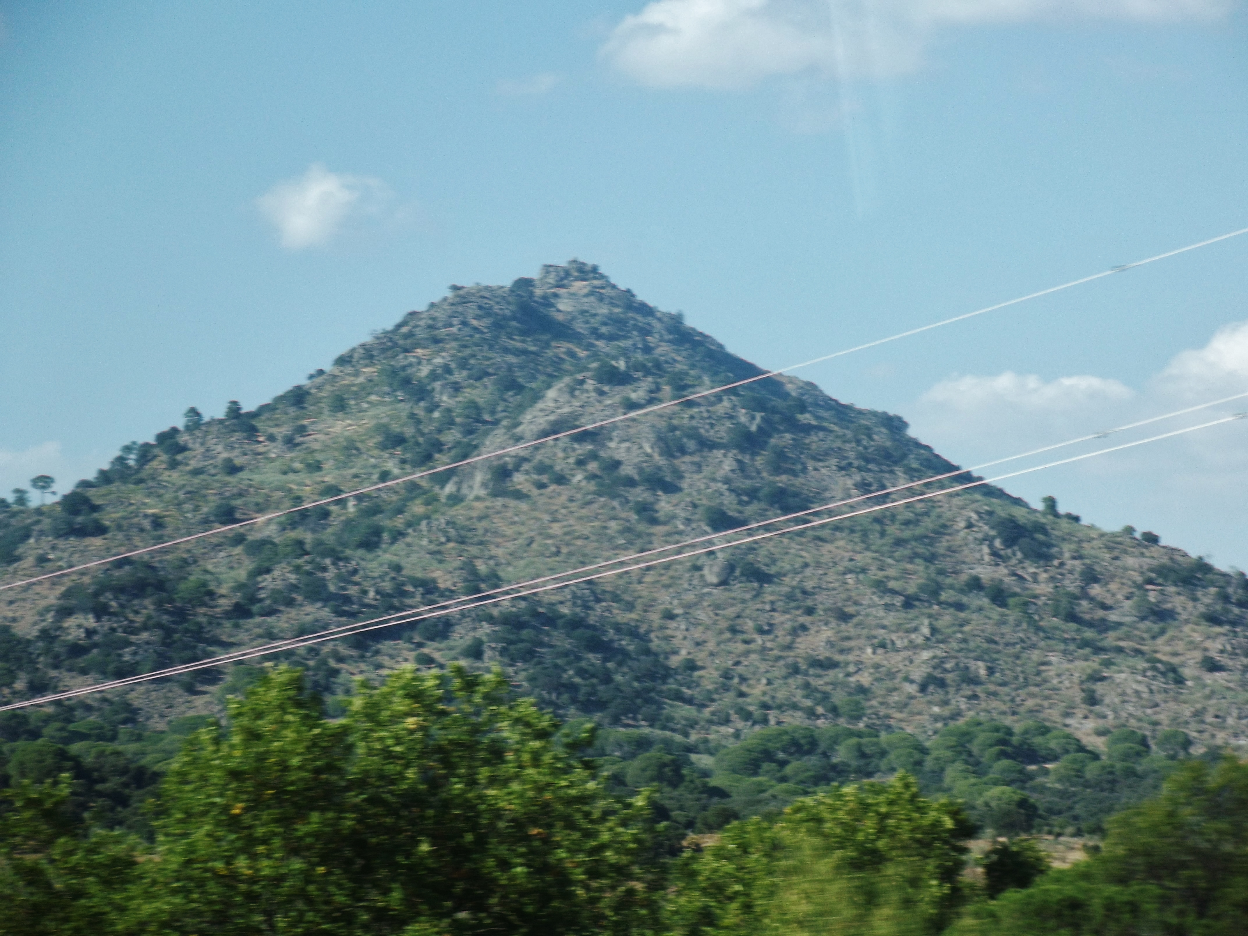 Almenara, desde la M-501